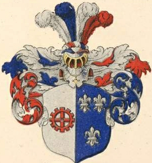 Mülleri (Kunda) suguvõsa aadlivapp